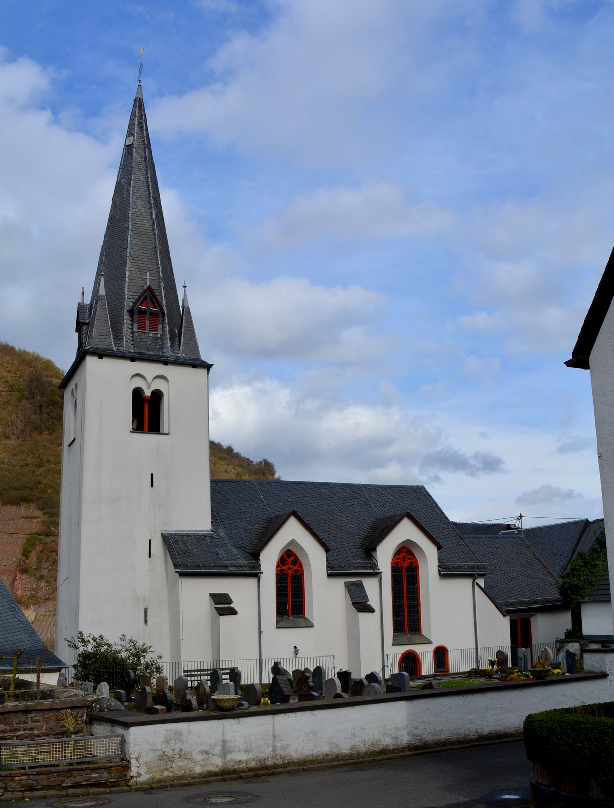 Briedern, Sint-Servatiuskerk